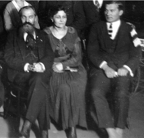 Сустрэча беларускага нацыянальнага актыву ў Празе 30 снежня 1924 г. на 40–я угодкі смерці В. Дуніна–Марцінкевіча. Злева направа: Пётра Крачэўскі, Ніна Крачэўская і Уладзімір Пракулевіч.